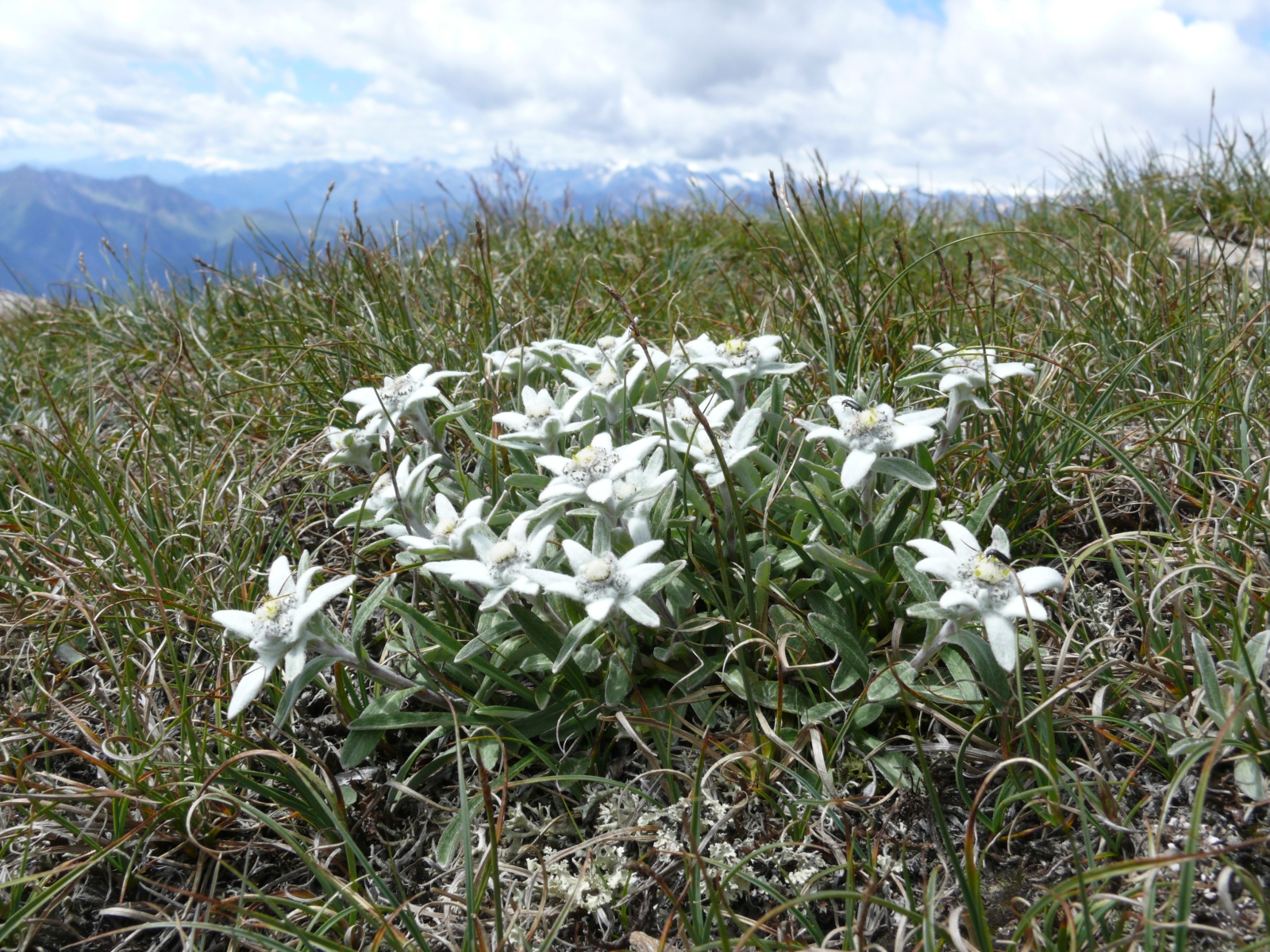 Leontopodium alpinum, Zillertaler Alpen, Italy